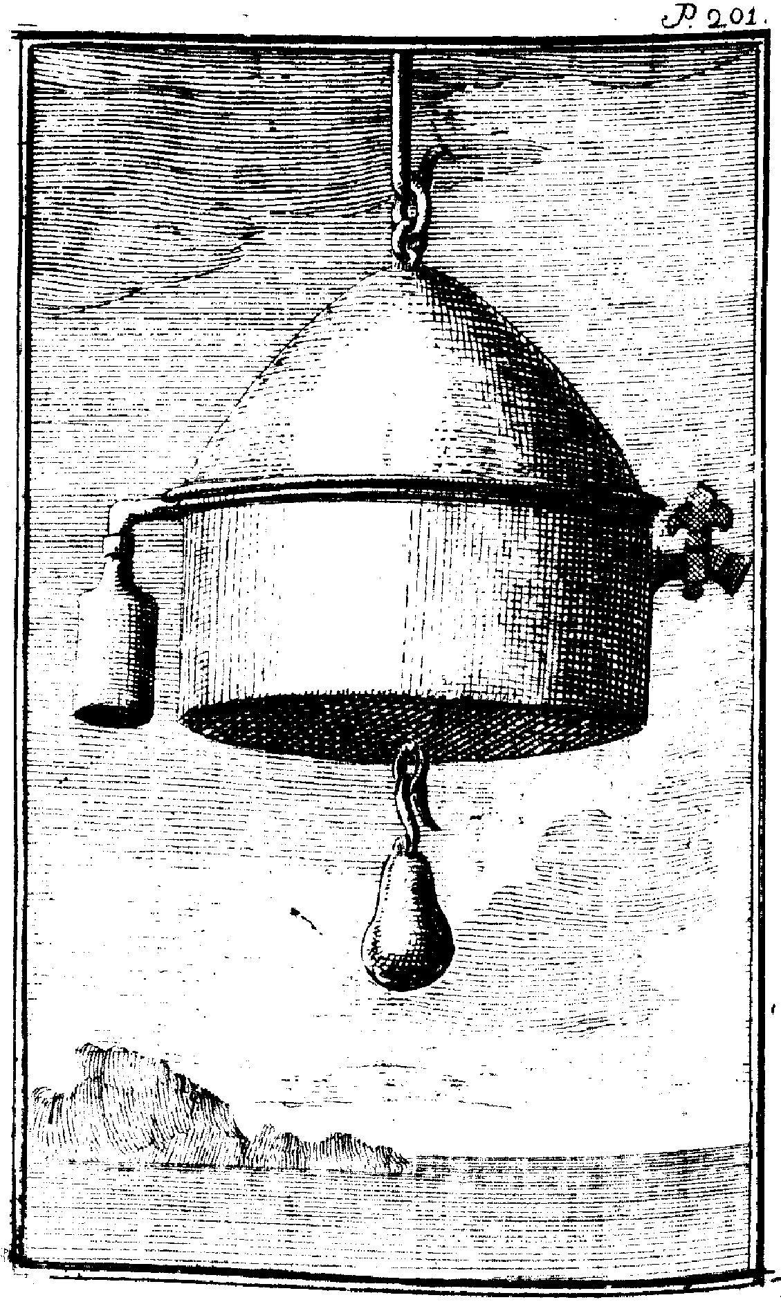 Processo di potabilizzazione tratto da Dell'origine delle fontane e dell'addolcimento dell'acqua marina